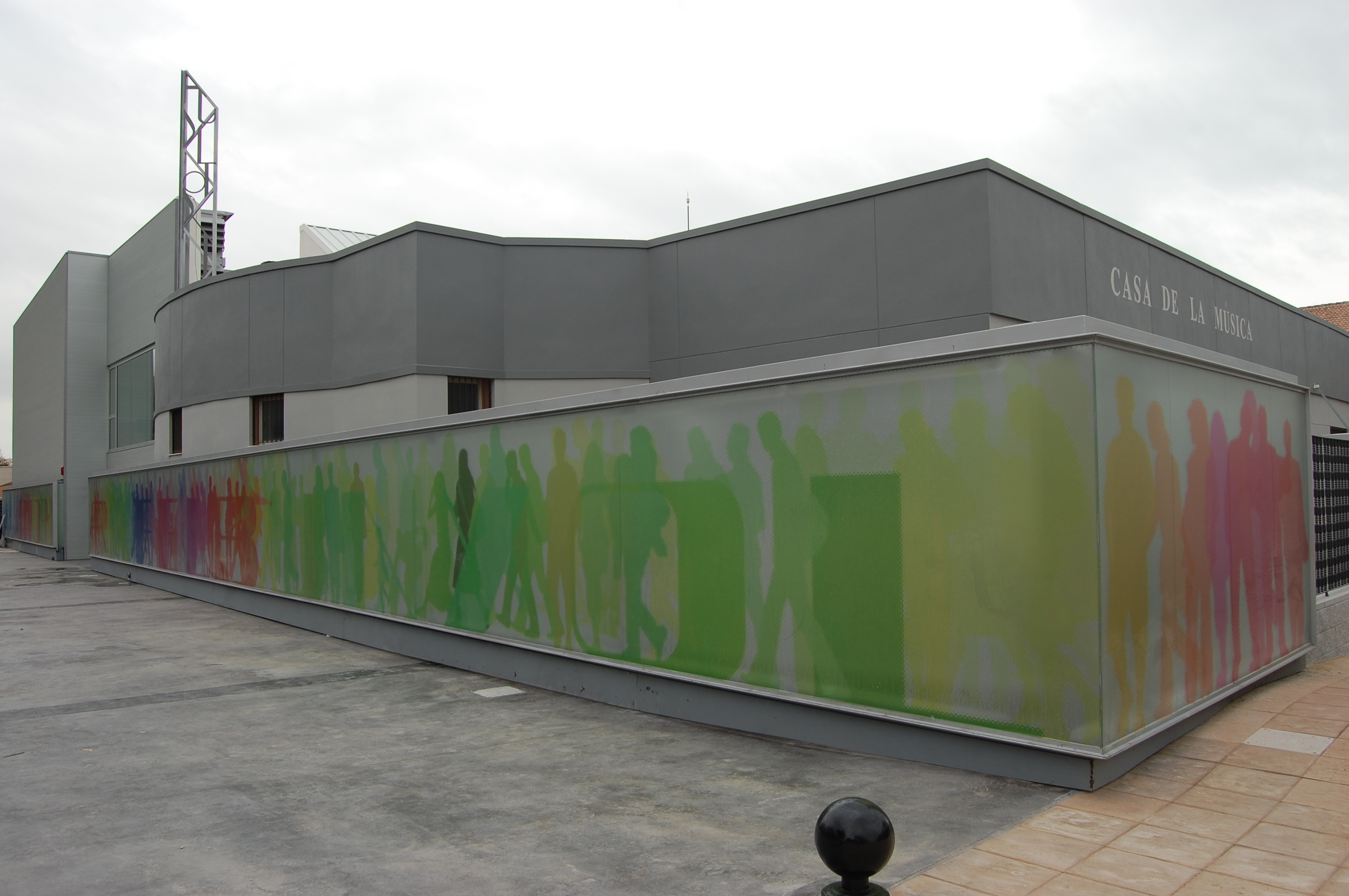 Vista parte frontal